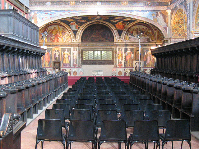 Il "coro delle Monache" della chiesa di san Maurizio a Milano.